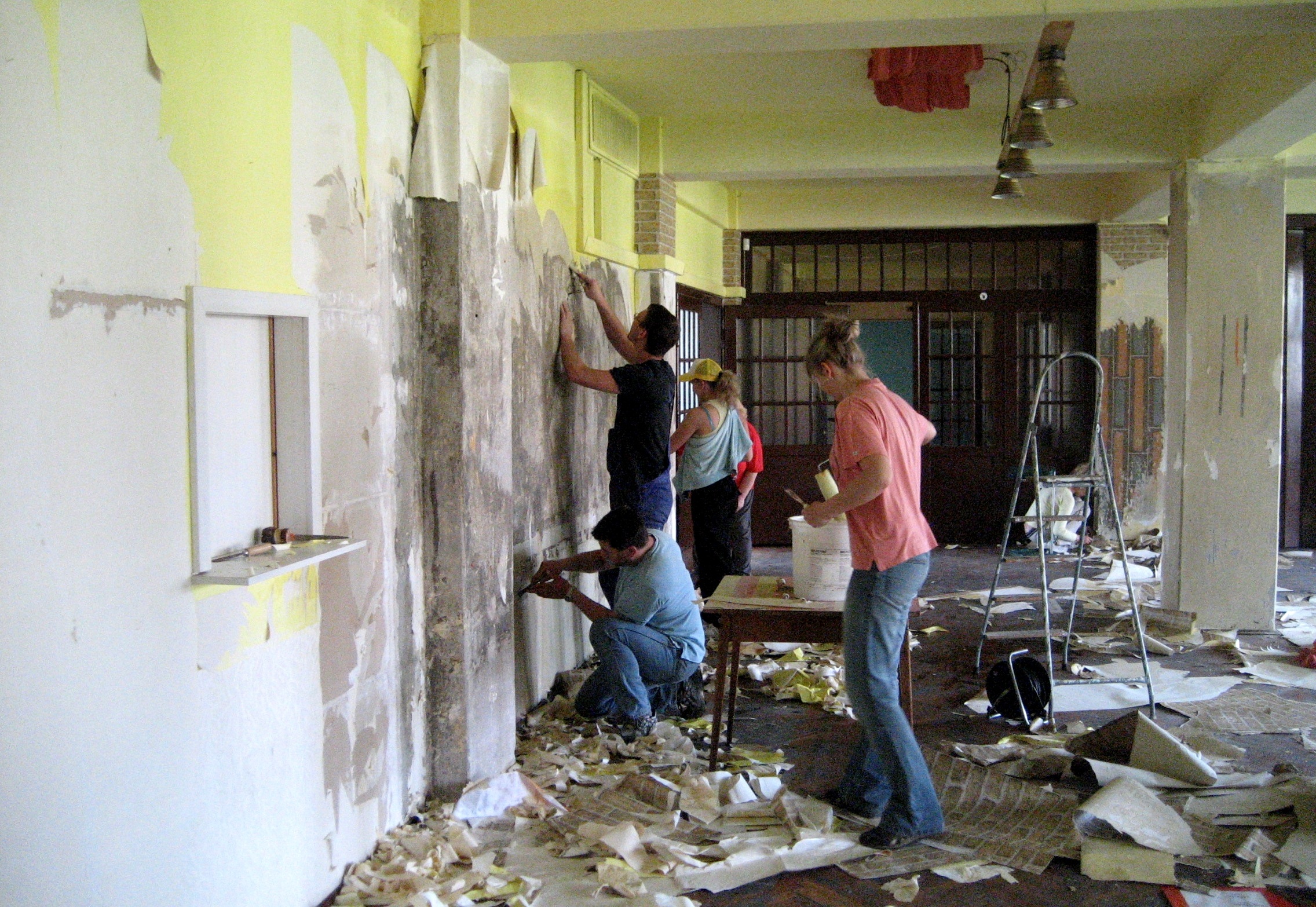 Kulturhaus Plessa (culture house Plessa, small hall, renovation with volunteers, 2009) 1